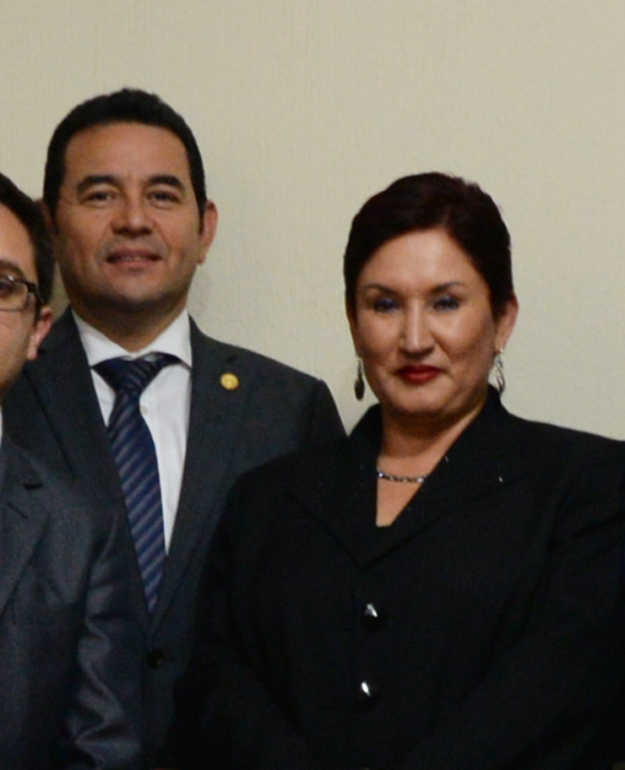 Inauguración de la CICIG en Quetzaltenango